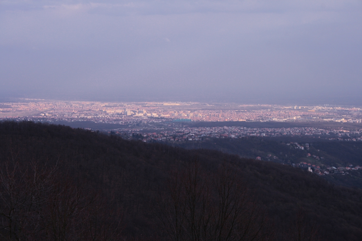 Dubrava s Medvedgrada, Zagreb, Hrvatska